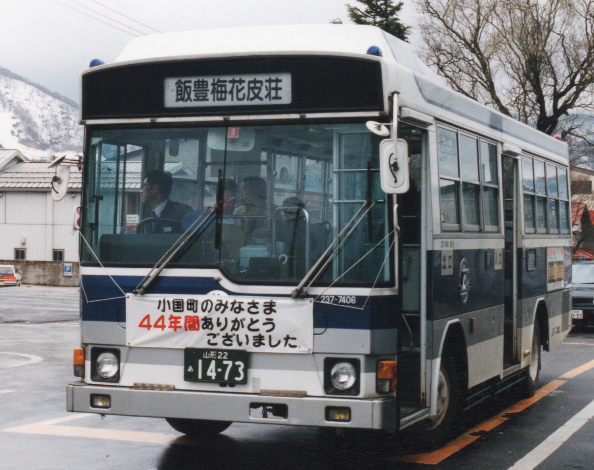 小国駅前にて撮影